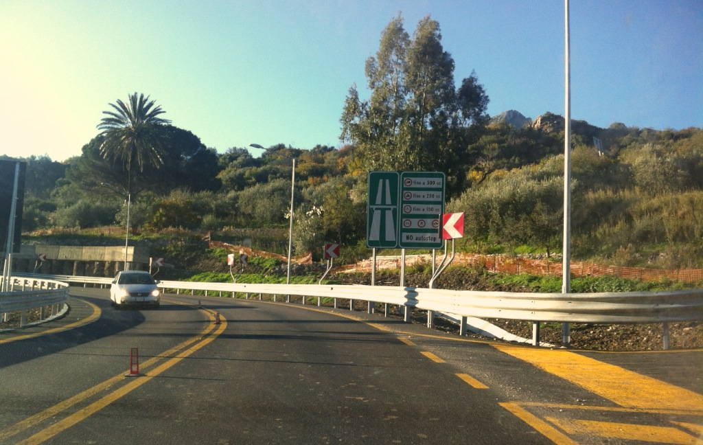 La bretella di collegamento provvisoria realizzata dopo il cedimento del viadotto Himera sull'autostrada A19 Palermo-Catania.